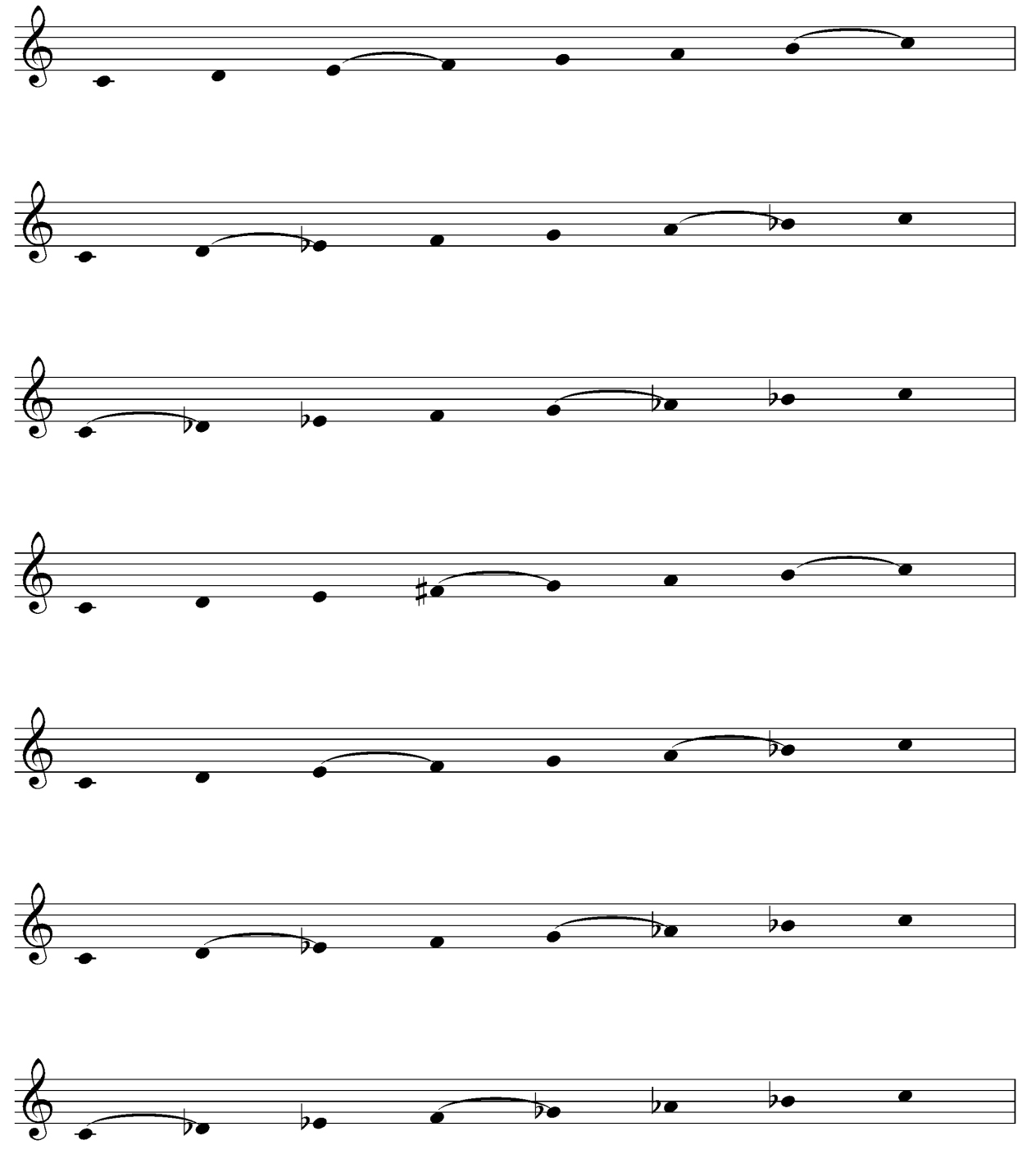 ModosParalelos